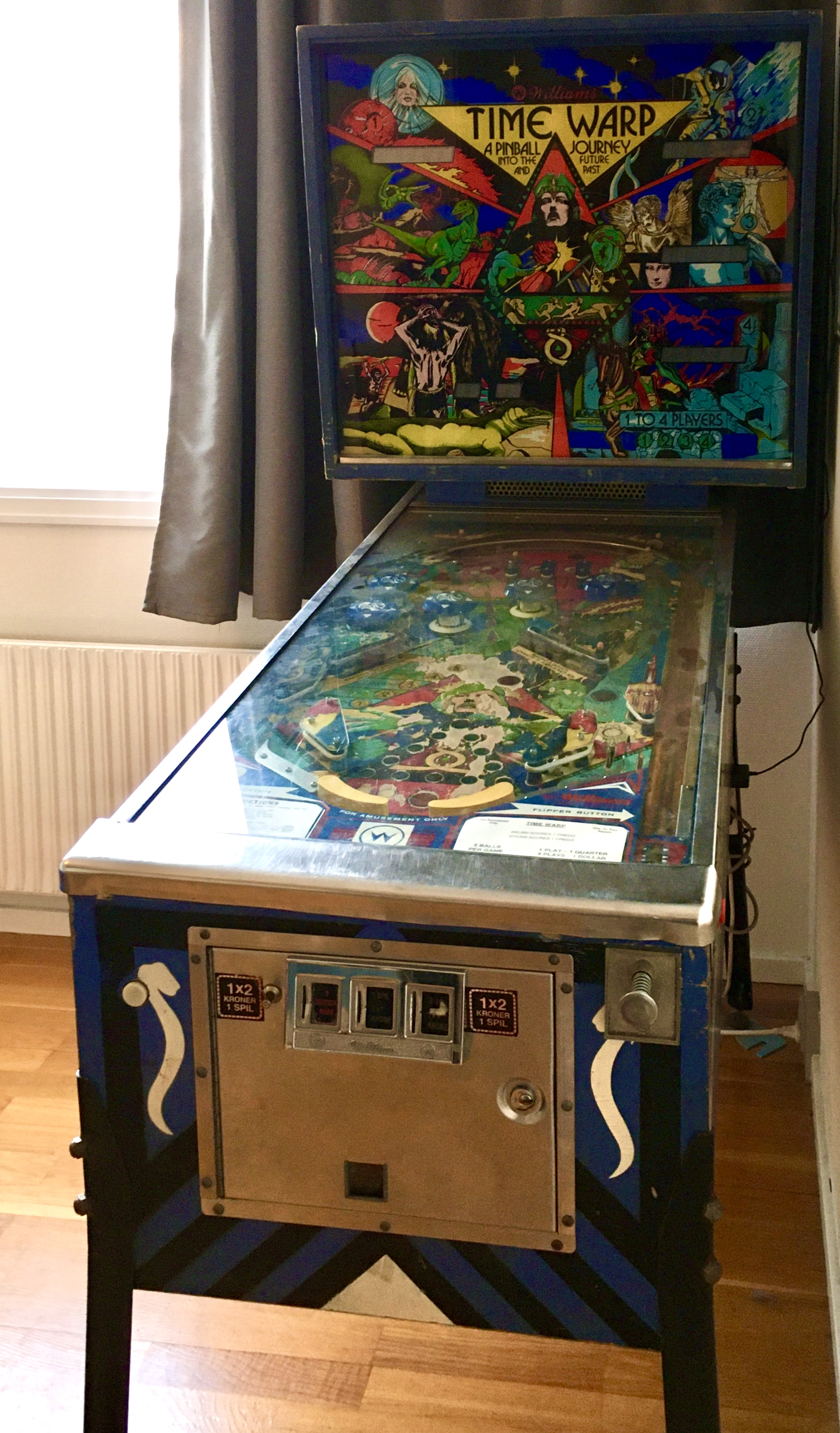 A picture of Time Warp Pinball from 1979